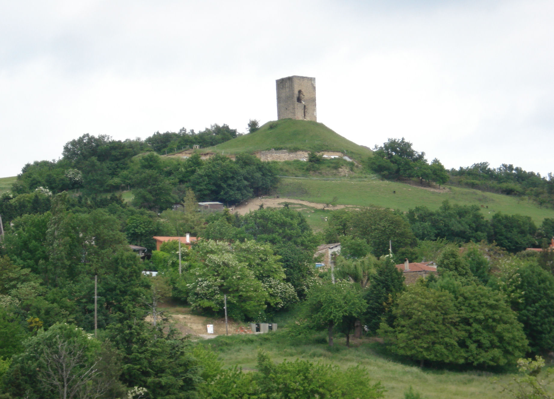 Tour d'Albon dans la Drôme